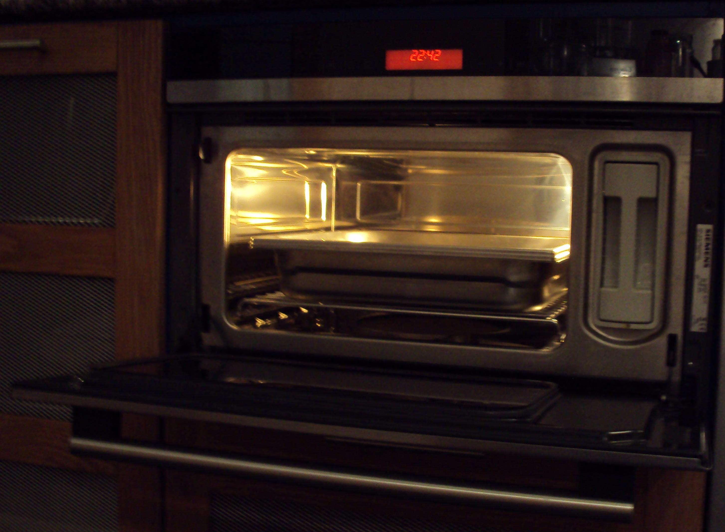 Stoomoven van Siemens